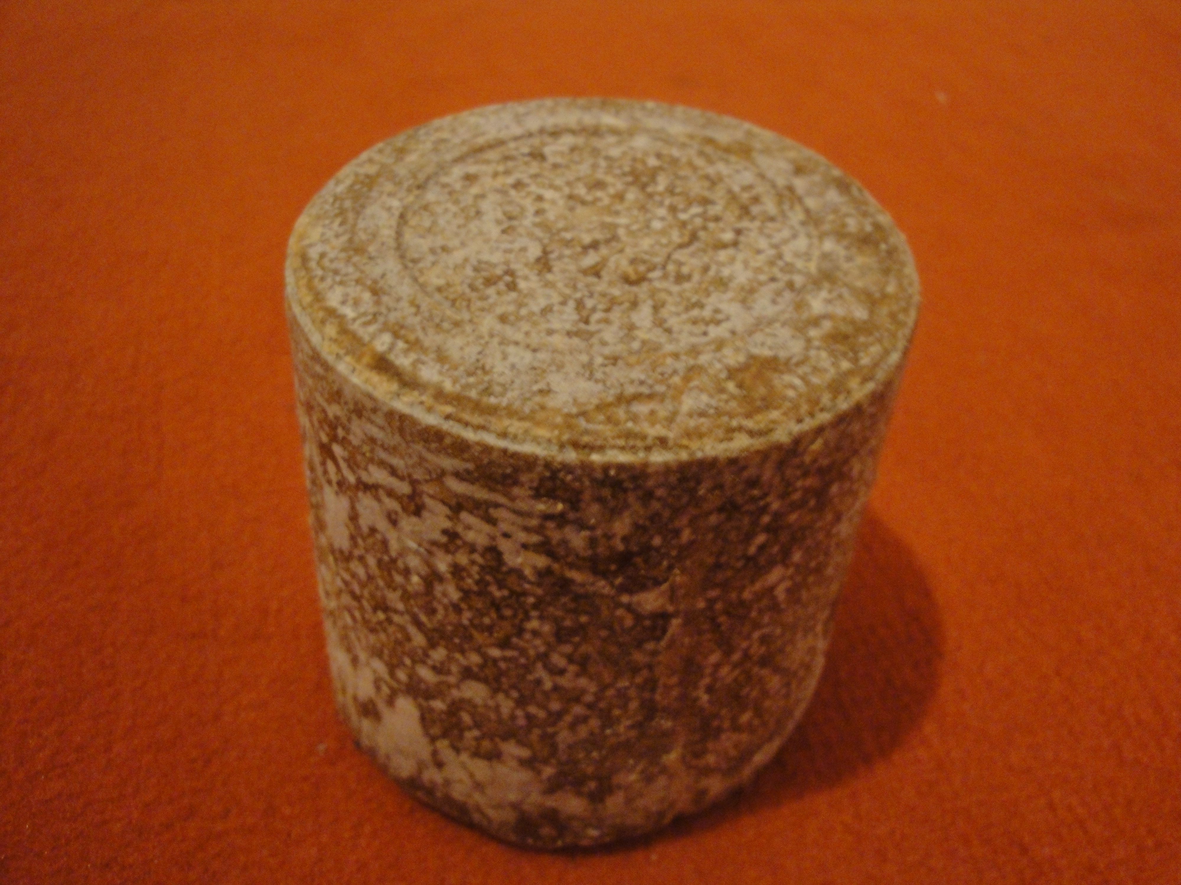 bloc d'odika ou chocolat indigène du Gabon, utilisé dans la cuisine gabonaise